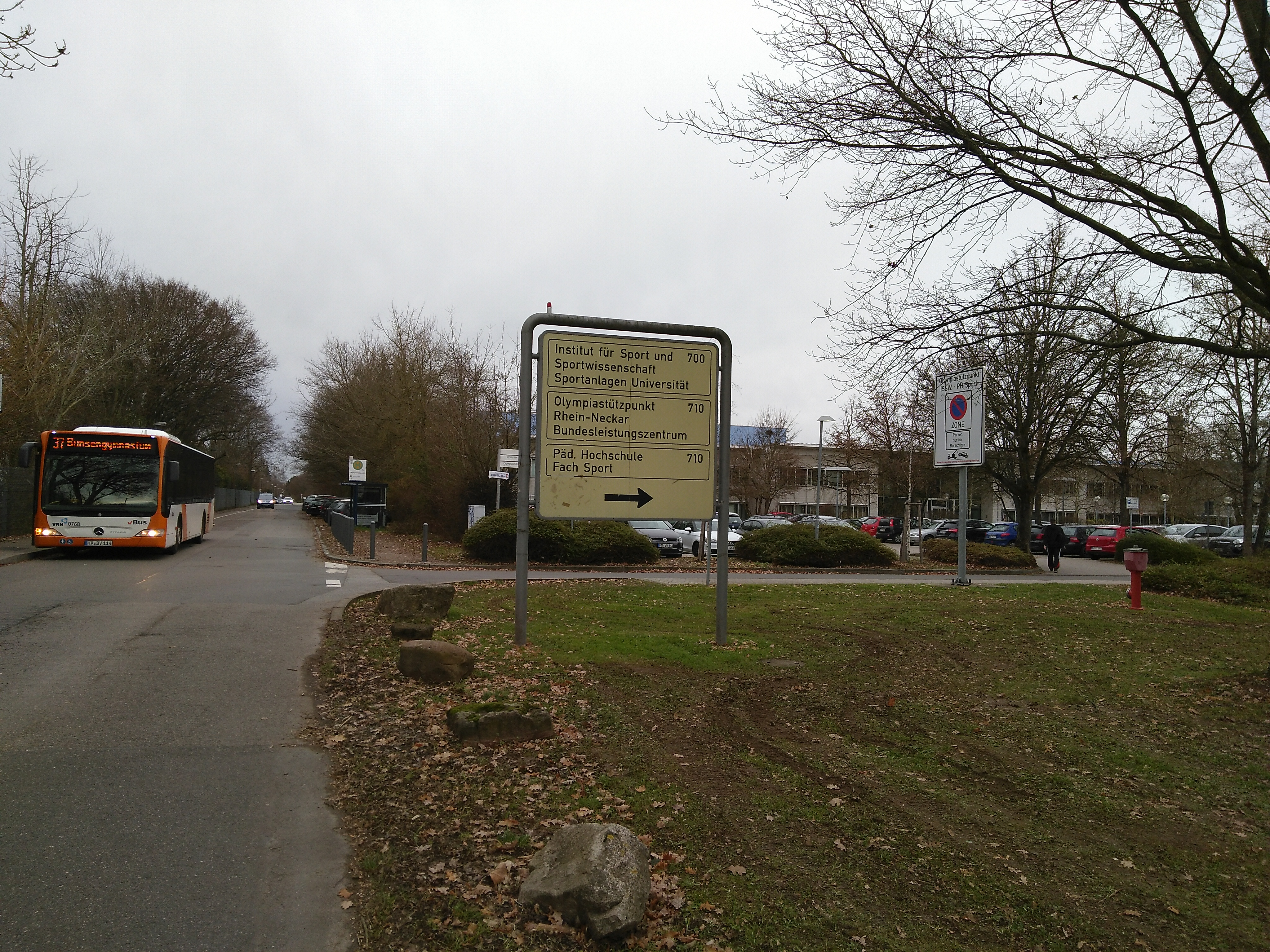 Schild, Zufahrt zum Olympiastützpunkt mit Haltestelle